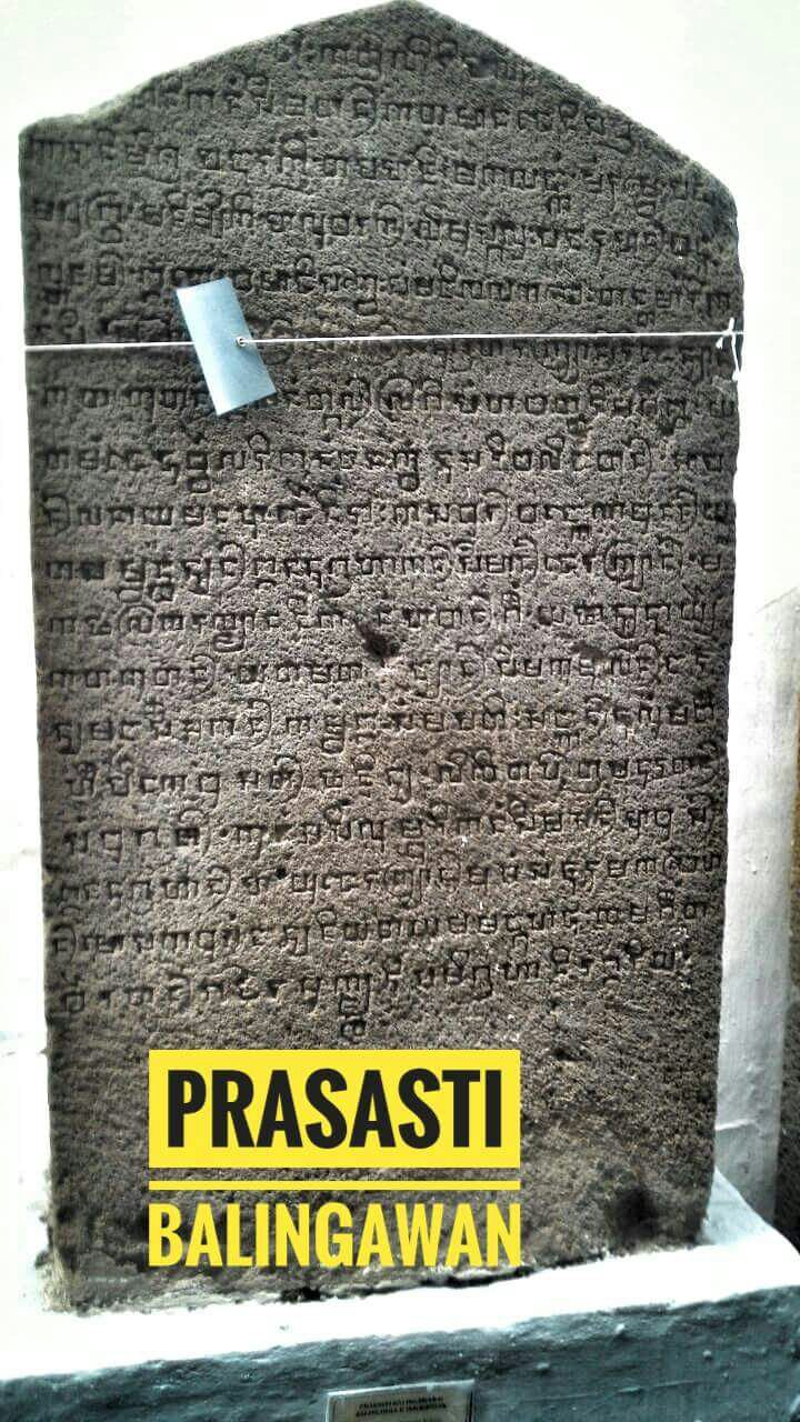 Foto prasasti balingawan